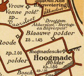 Blauwe Polder